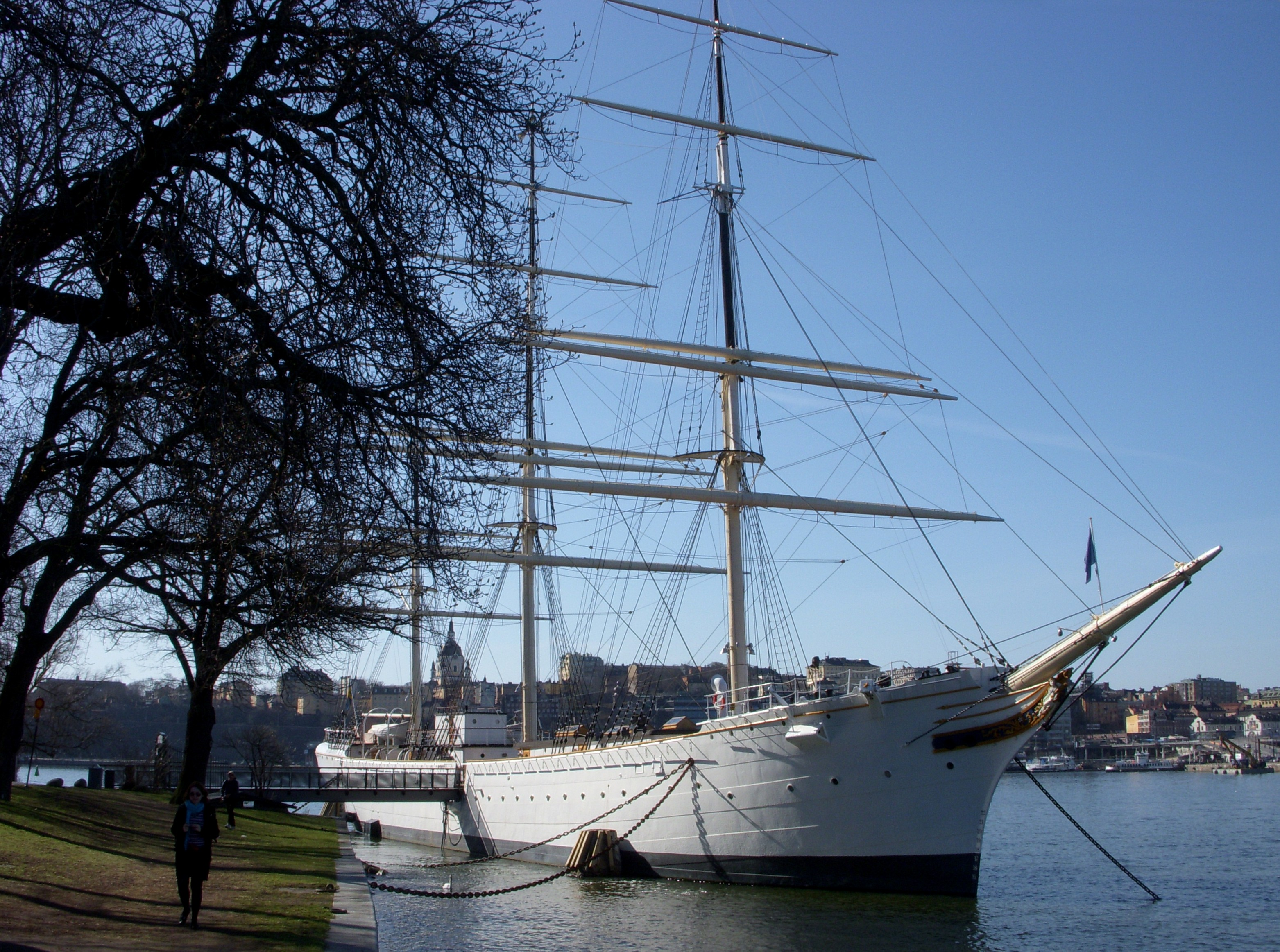 Af Chapman i Stockholm